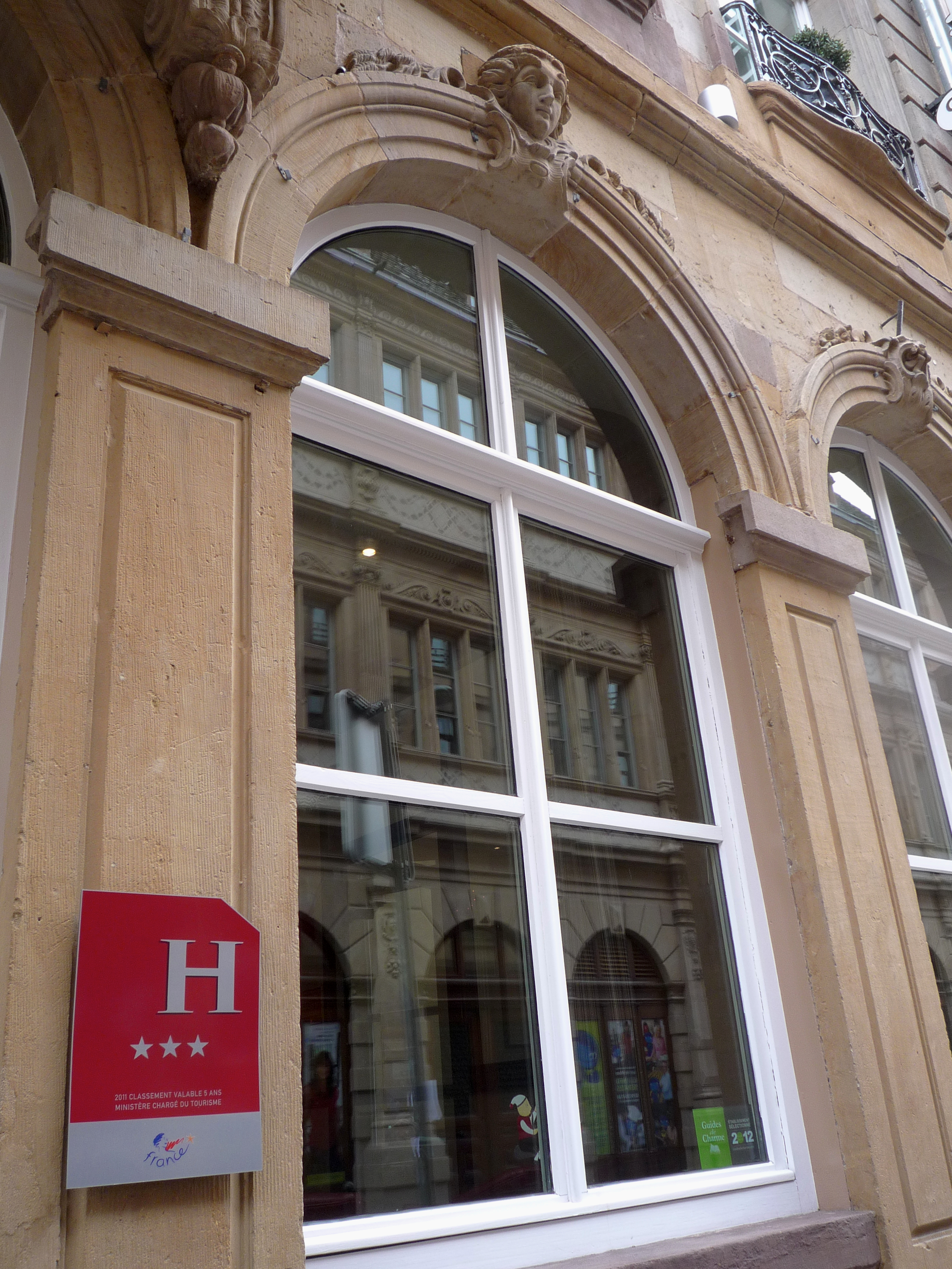 Strasbourg 31 rue des Serruriers, plaque de classification trois étoiles de l’hôtel Gutenberg